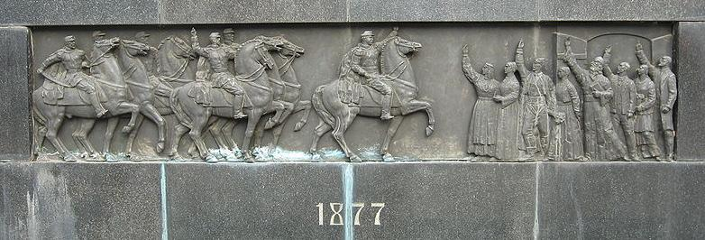 1877. Ослобођење Ниша од Турака, рељеф на Споменику ослободиоцима Ниша. Слику са заједничке оставе преузео и прерадио МилеМД. 6.10.2010.